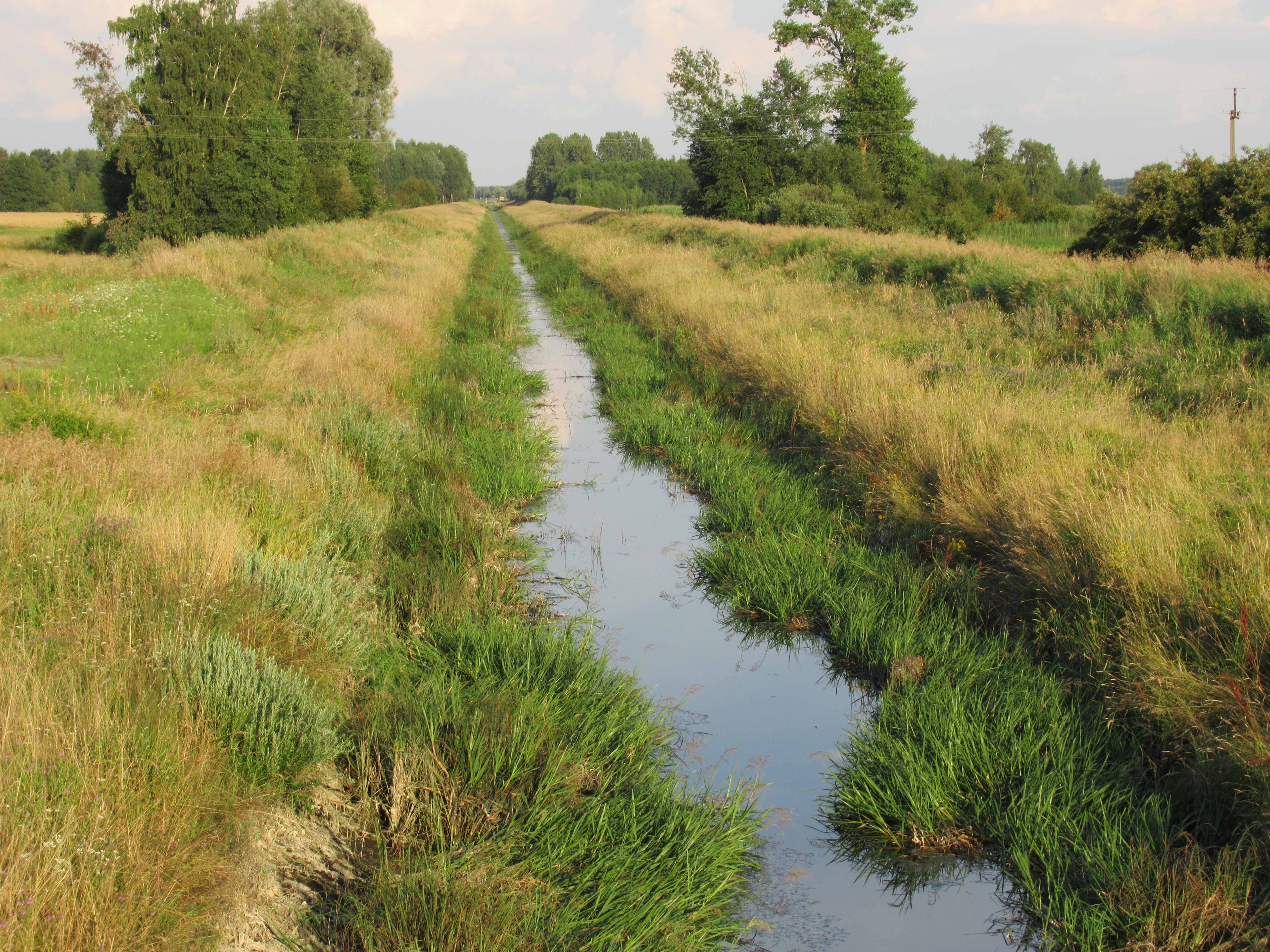 Łózki (pow. bialski, woj. lubelskie, Polska). Kanał Wieprz – Krzna.